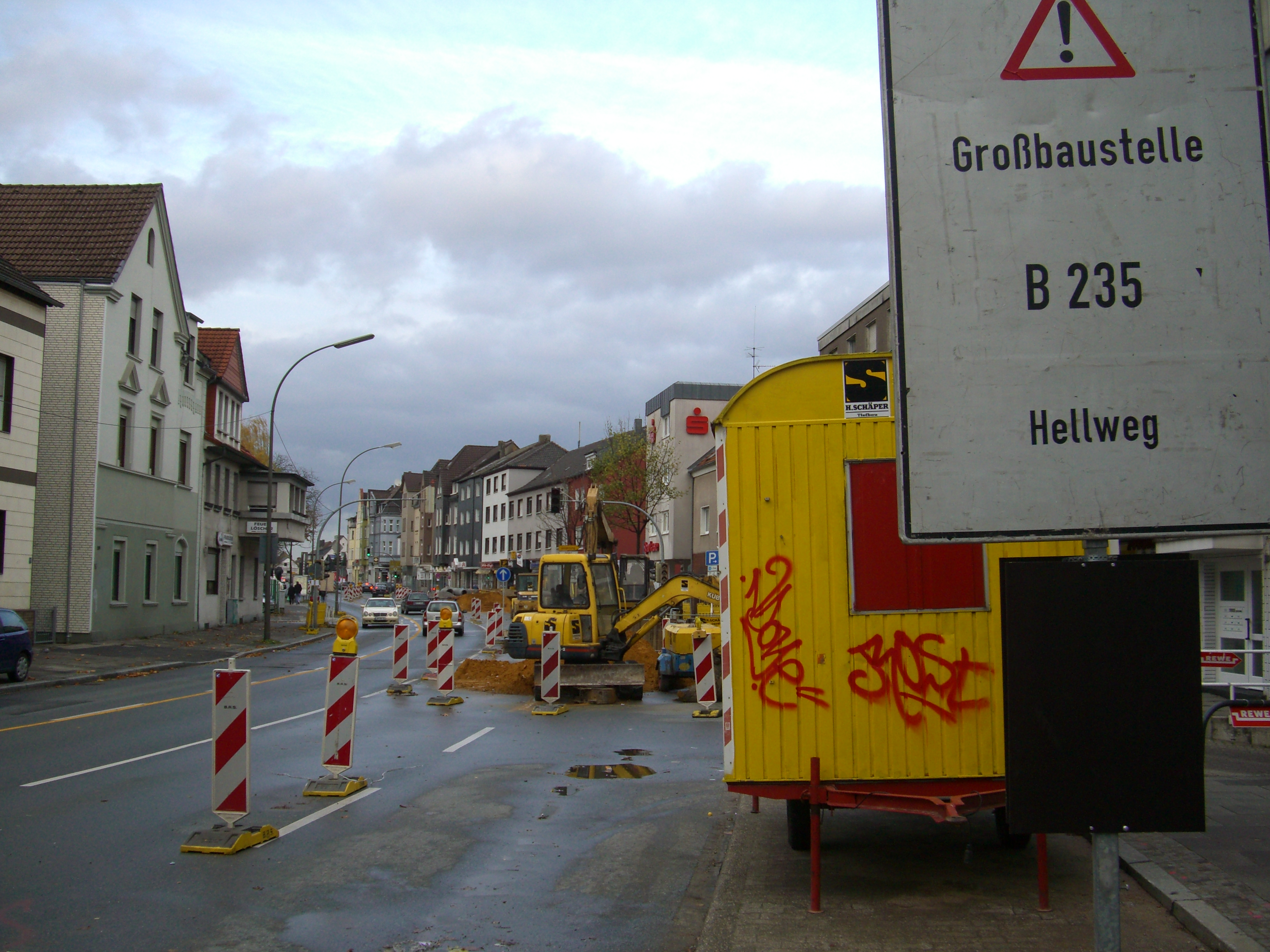 Dortmund-Bövinghausen, B235